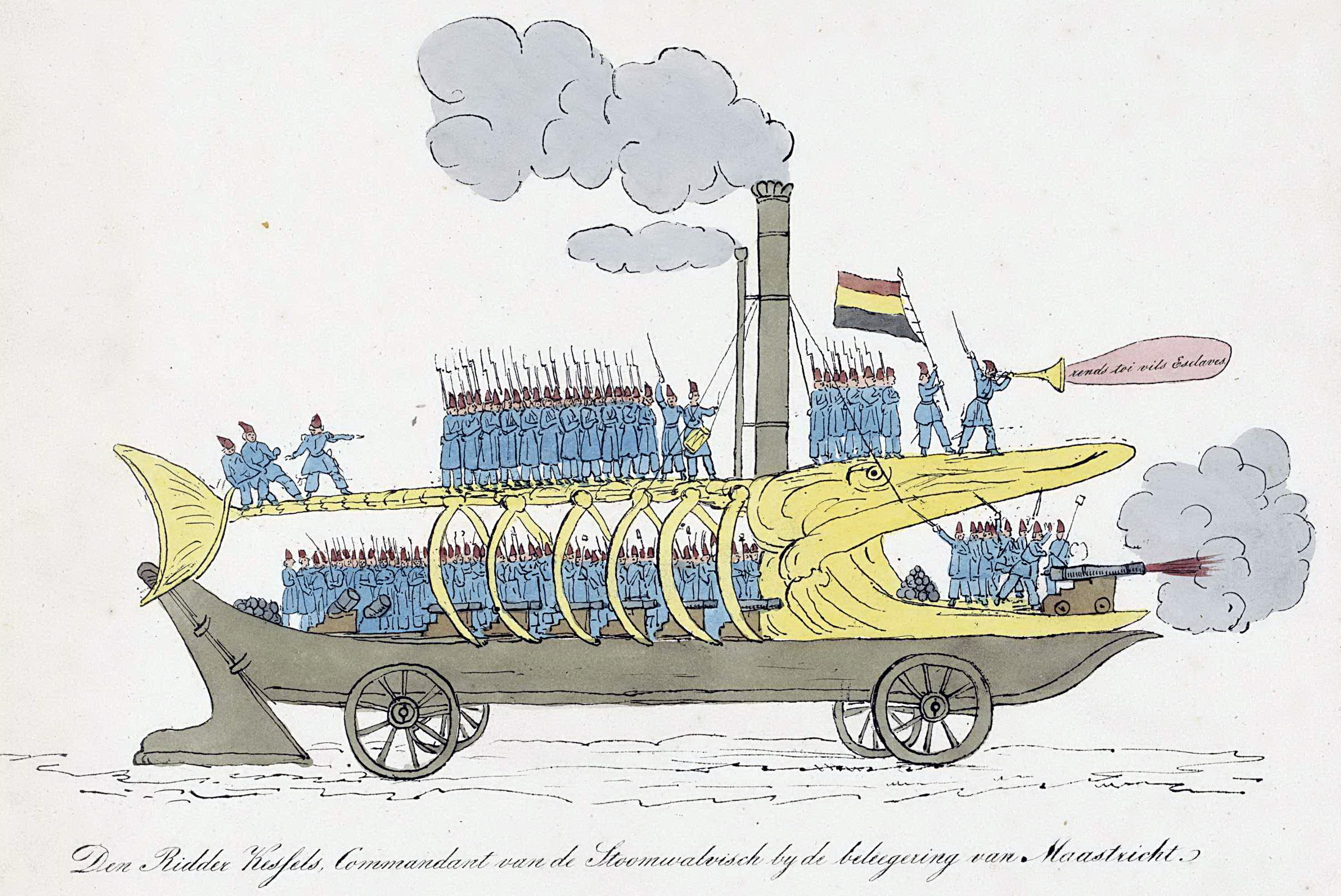 Spotprent op generaal Herman Kessels en zijn geraamte van een walvis, 1830-1831. De walvisgeraamte is voorzien van wielen en een stoommachine en bemand door Belgische opstandelingen. Vanuit de mond wordt een kanon afgevuurd. De titel verwijst naar de Belgische belegering van Maastricht in 1830-1831. Collectie Rijksmuseum Amsterdam, RP-P-OB-88.348.